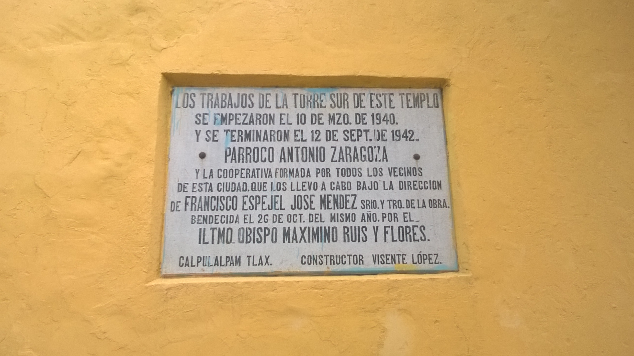 Placa en la Iglesia de San Antonio en Calpulalpan, Tlaxcala